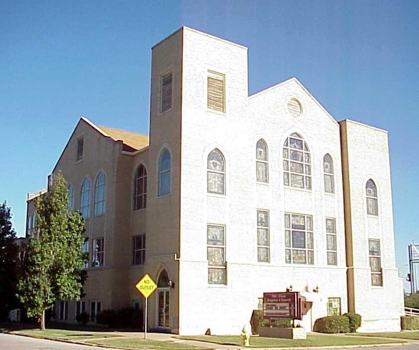 Mt Zion Baptist Church, 419 N. Elgin, Tulsa, Oklahoma